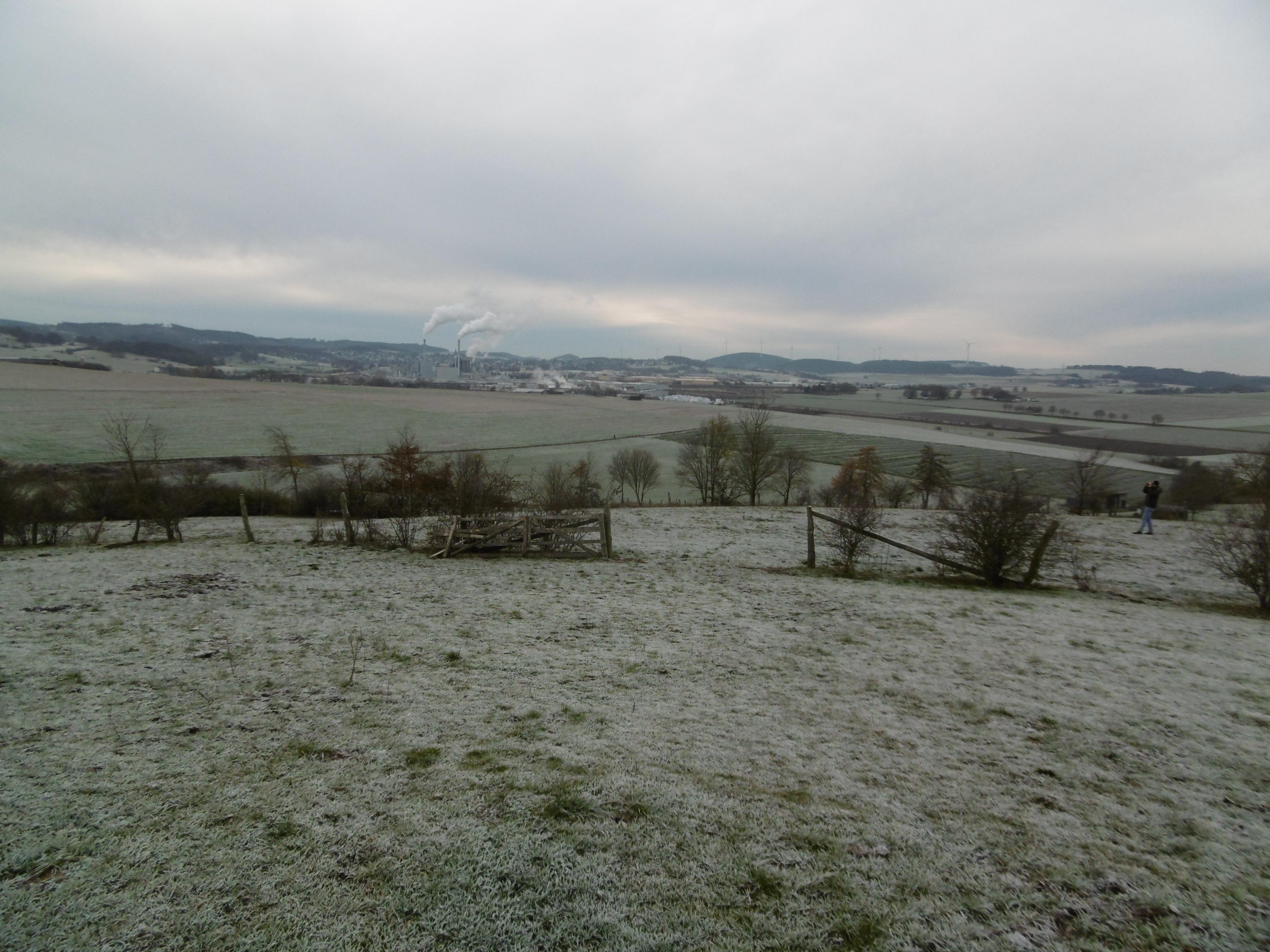 Blick vom Naturschutzgebiet Feldberg (Brilon, HSK-512)(vorne) Richtung Brilon mit Firma Egger in der Ferne ins Landschaftsschutzgebiet Offenland südöstlich Brilon​.